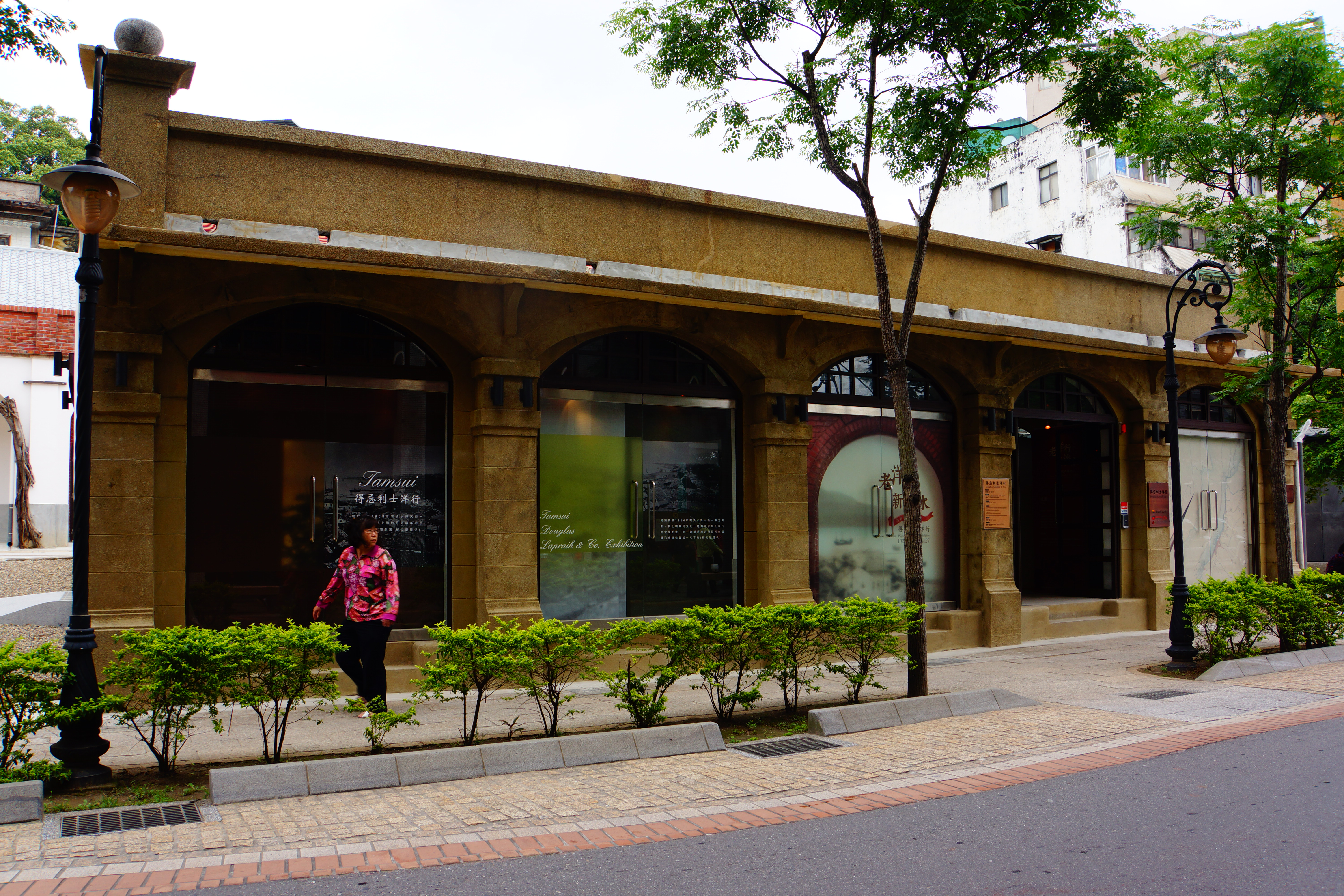 得忌利士洋行 Douglas Lapraik & Co.